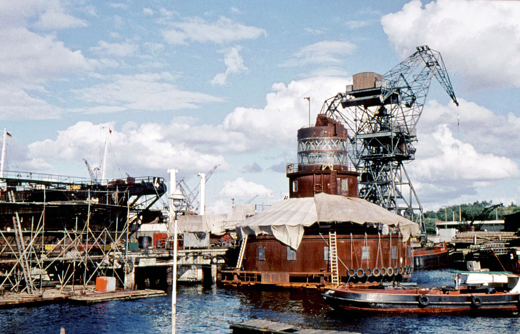 Leuchtturm „Alte Weser“ im Bau in Kiel 1961